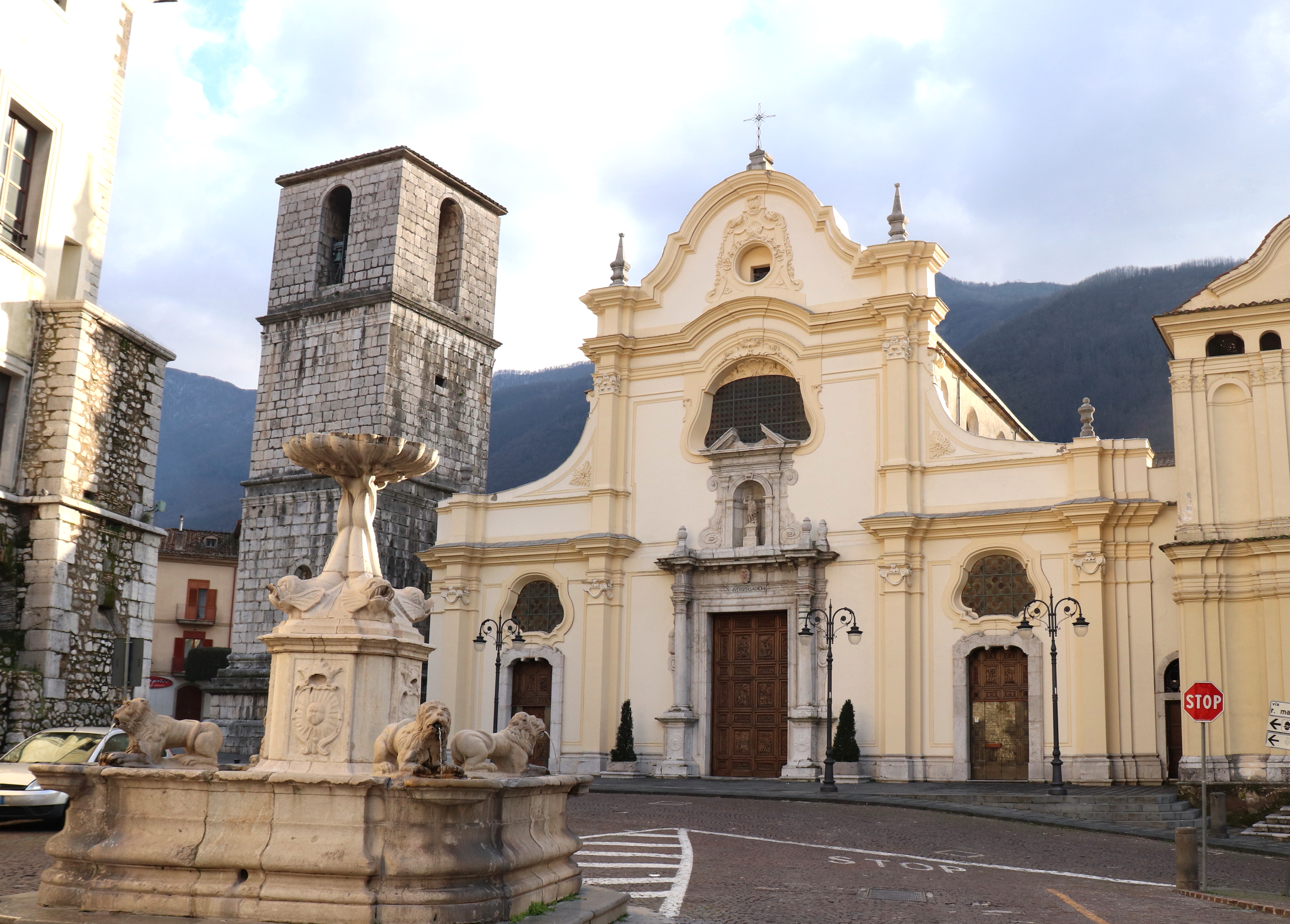 Facciata della collegiata con in primo piano la fontana dei Leoni